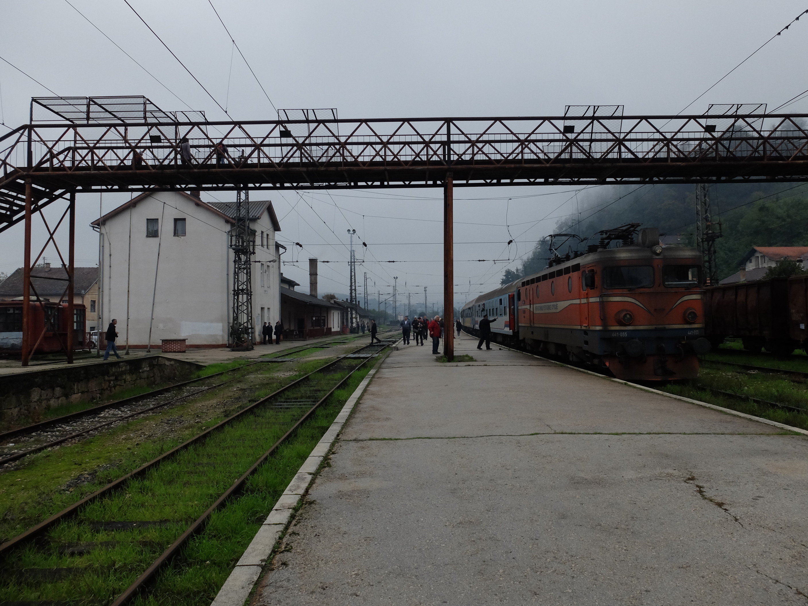 Novi Grad (Bahnhof) mit ŽRS 441 055 vor B 379 (Zagreb -Sarajevo)